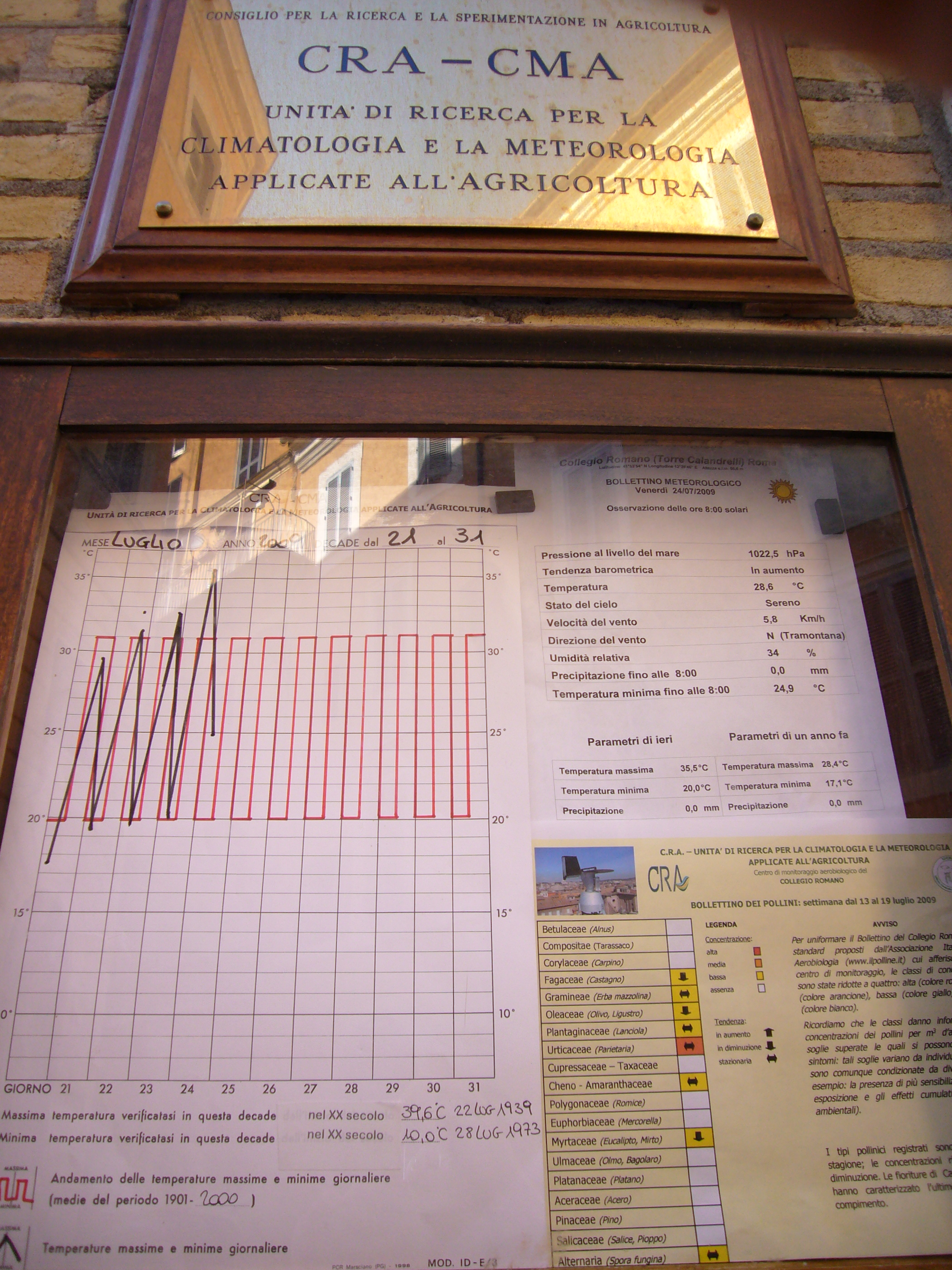 Roma, via del Caravita 7/a: bacheca della Stazione meteorologica di Roma Collegio Romano.